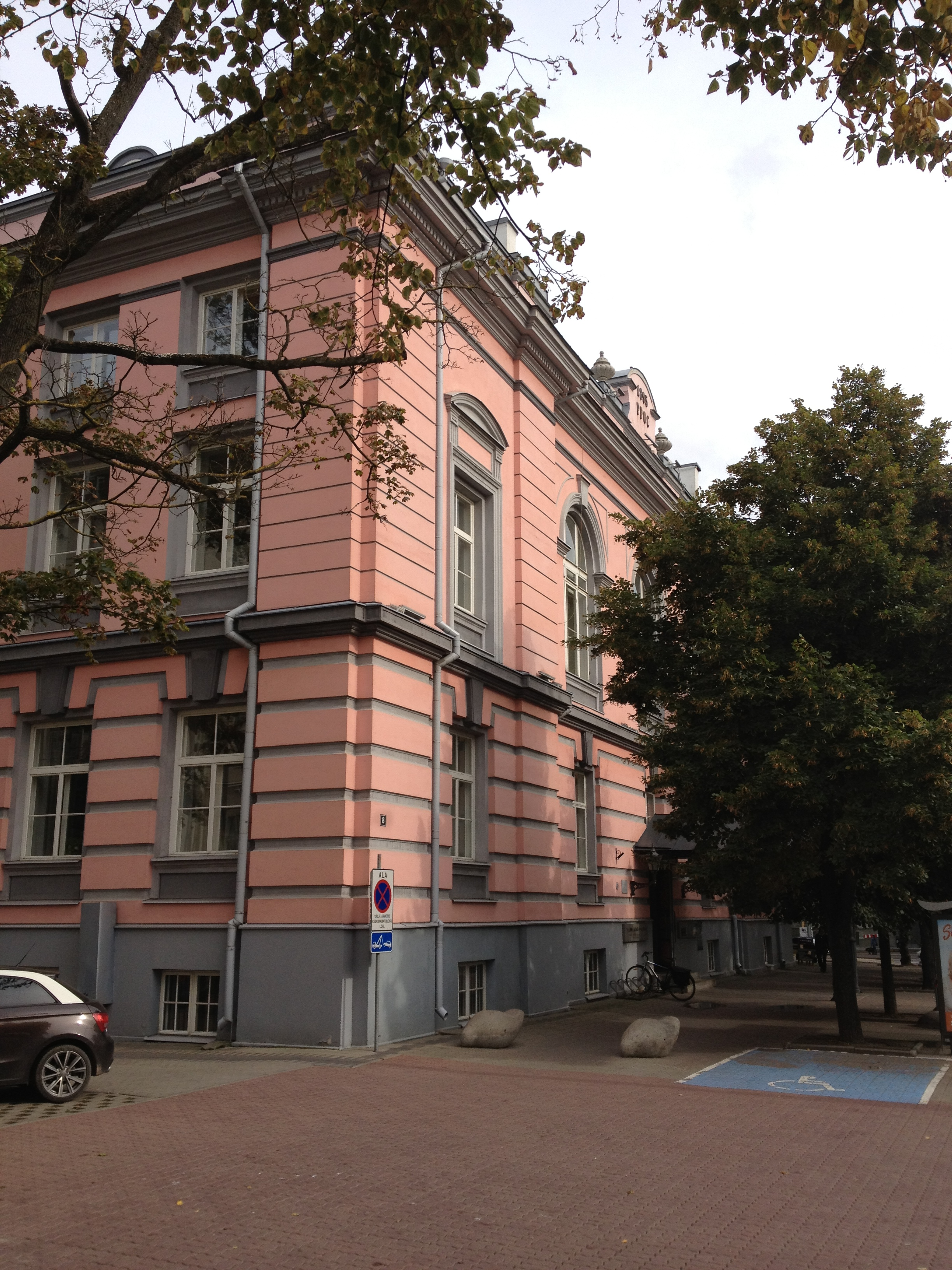 Tallinna vene seltskondliku kogu hoone, 1895. a.